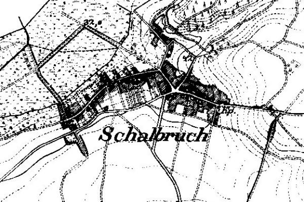 Neuaufnahme 1891 -1912